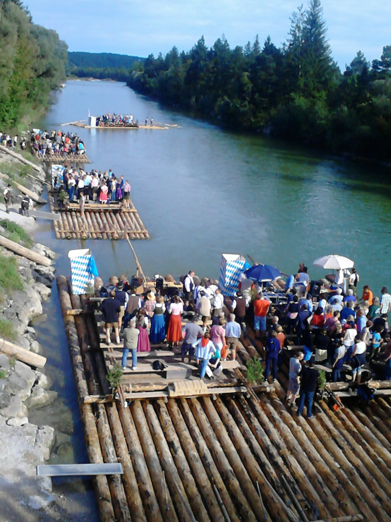 Floßabfahrt an einem Sommersonntagmorgen. Sicht von der Isarbrücke bei Wolfratshausen.